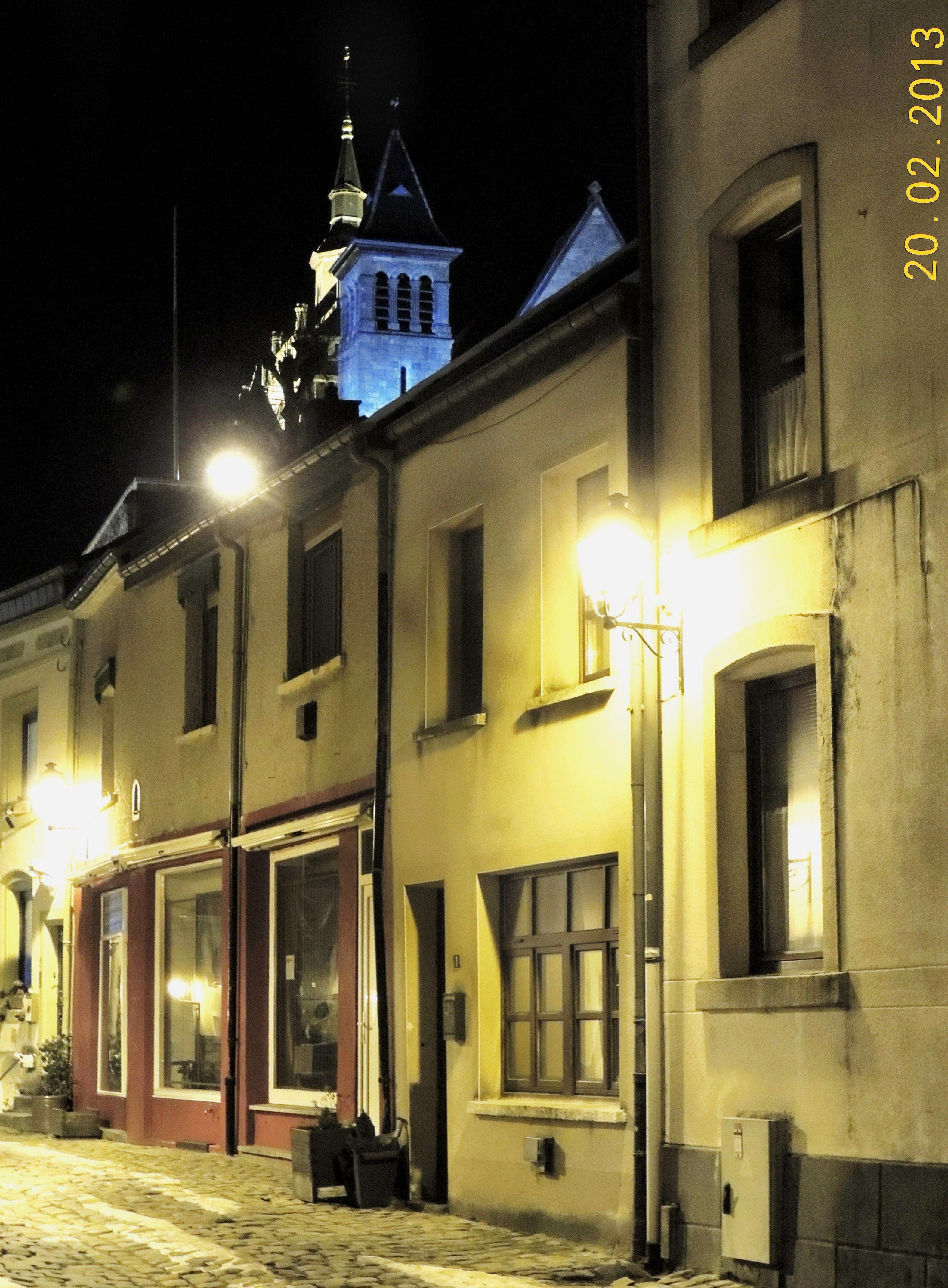 Rue Saint-Donat dans le vieux quartier d'Arlon appelé Hetchegass qui se situe sur la Knipchen (petite colline)